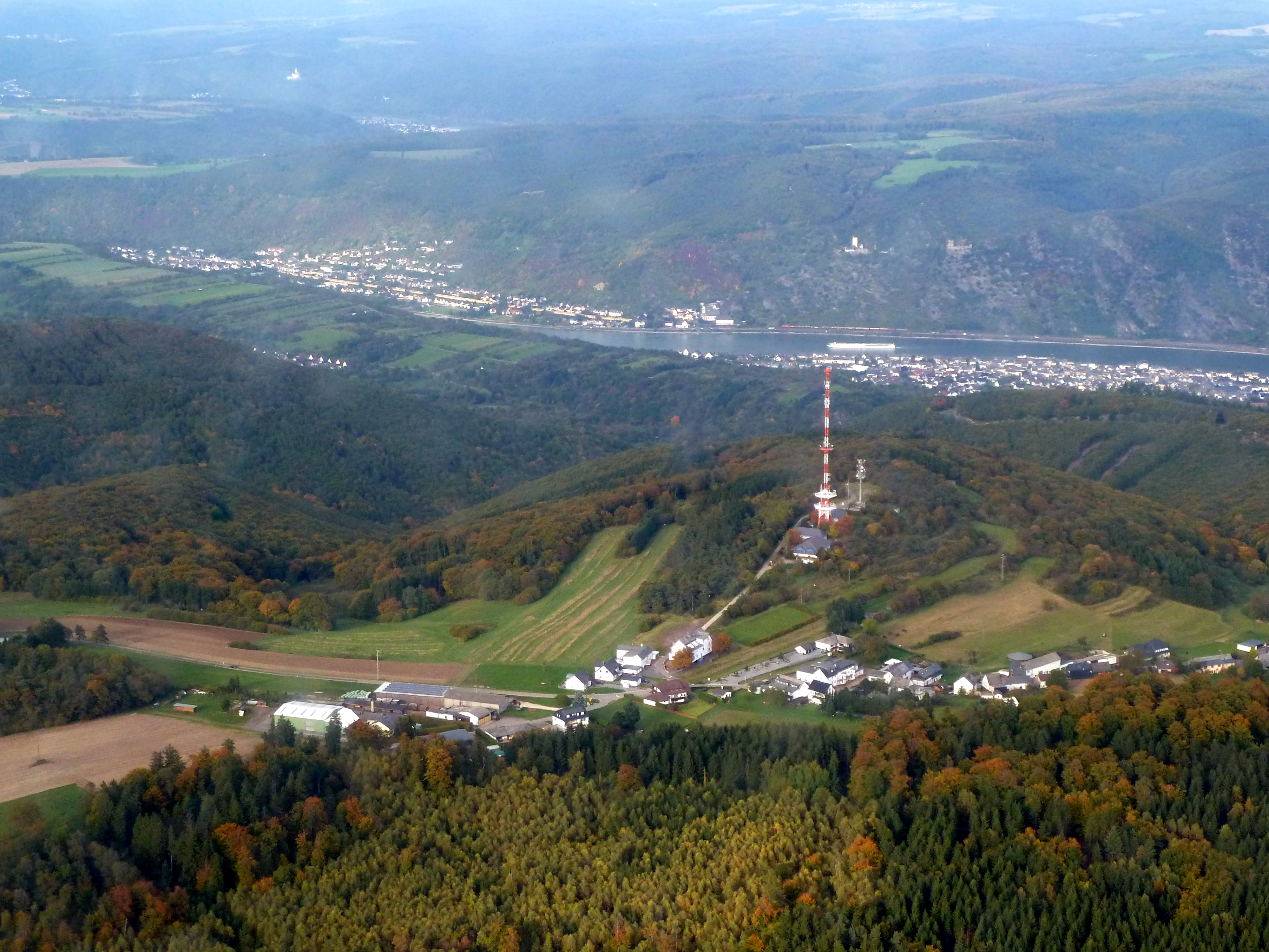 Im Vordergrund sieht man den Bopparder Ortsteil Fleckertshöhe und im Hintergrund den Ortsbezirk Bad Salzig und die Gemeinde Kamp-Bornhofen.